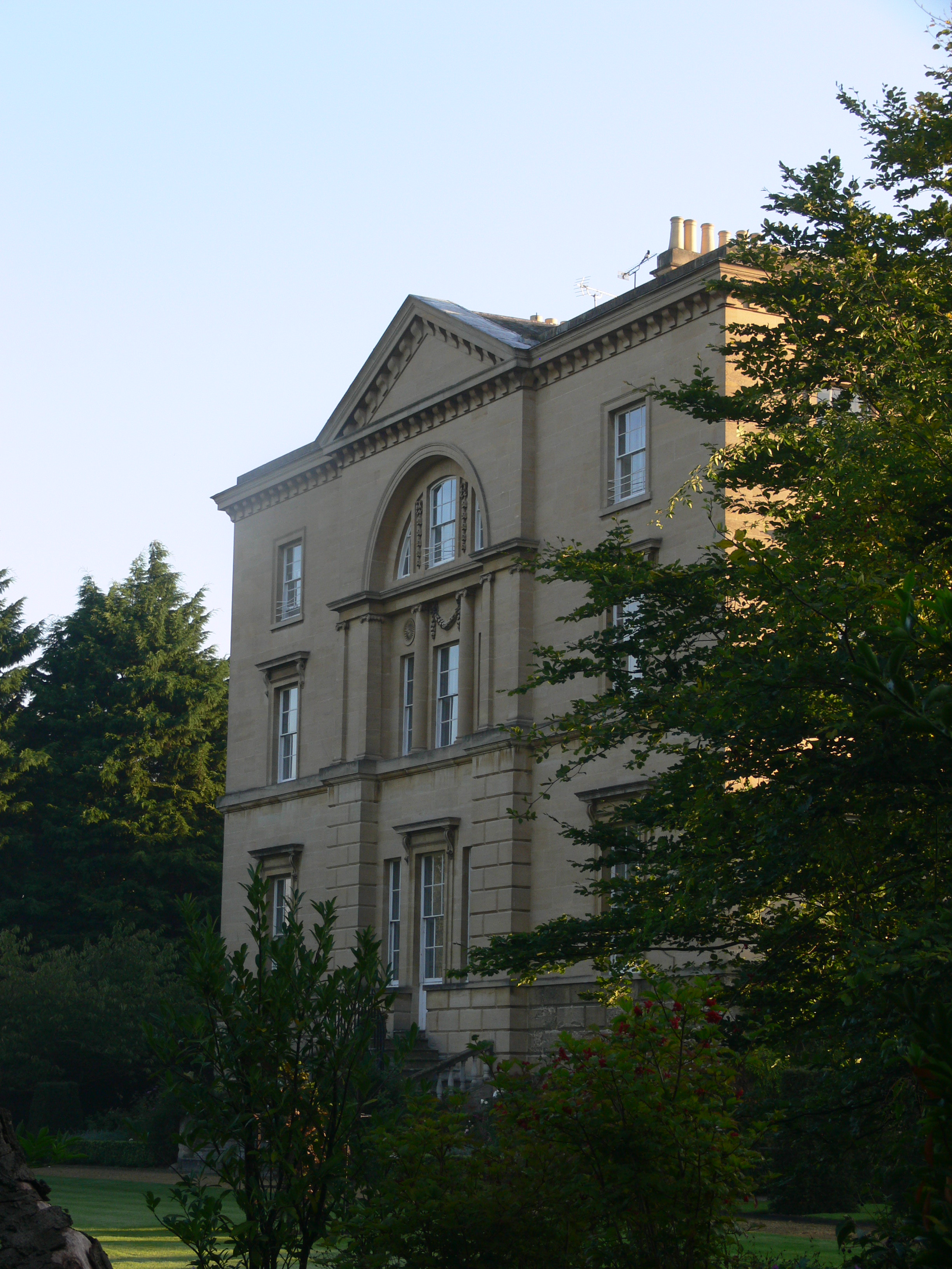 Oxford - Worcester College